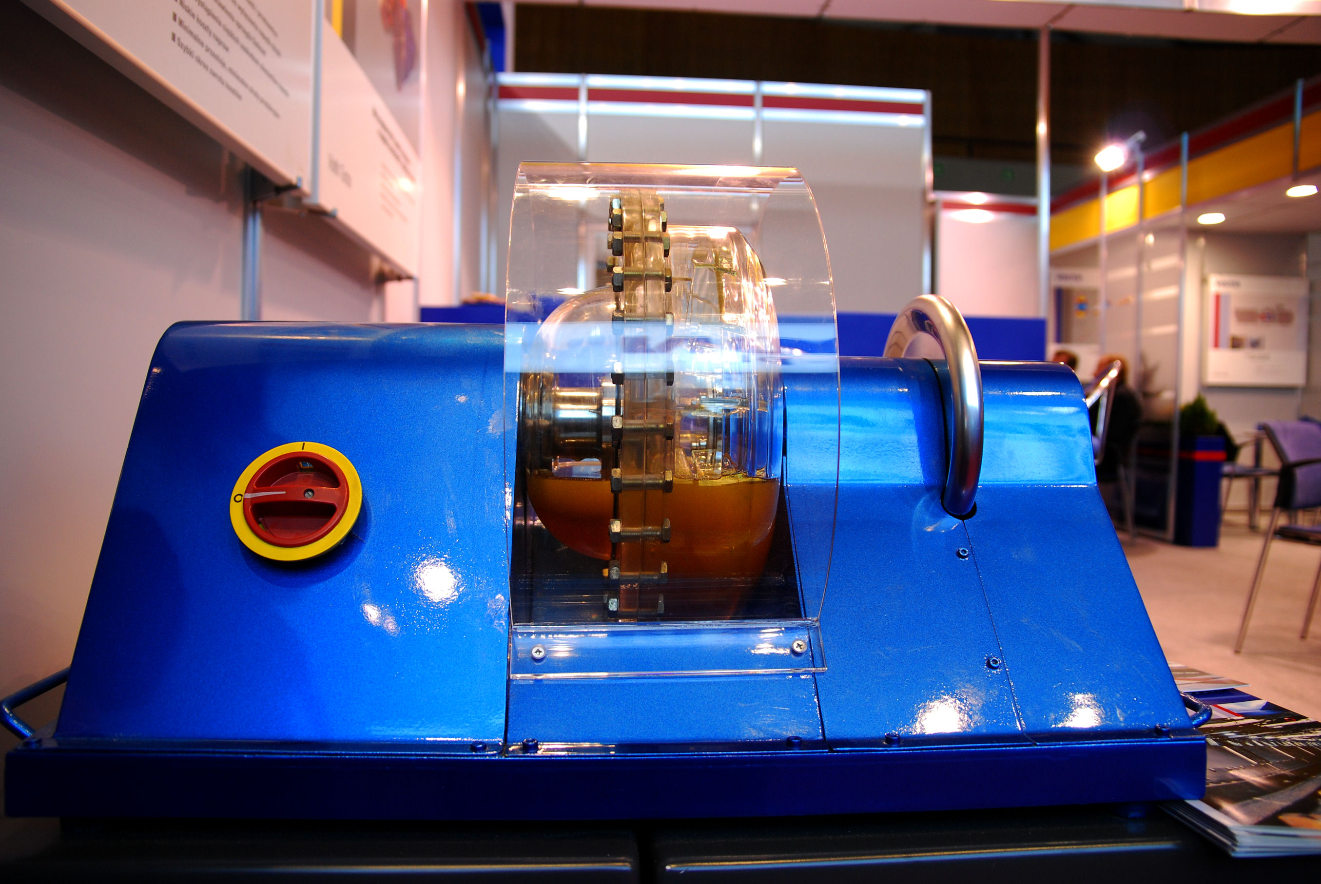 Urządzenie górnicze zdjęcie wykonane podczas Międzynarodowych Targów Górnictwa, Przemysłu Energetycznego i Hutniczego w Katowicach w Spodku